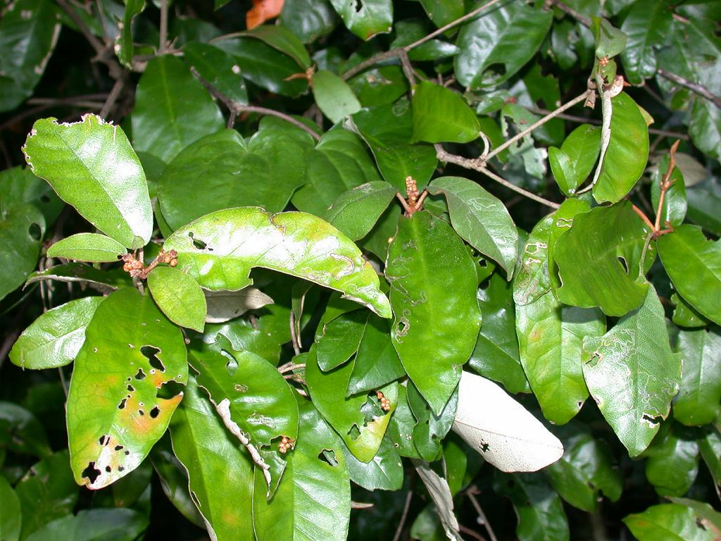 Croton cascarilloides：グミモドキ 2004/08/10 沖縄本島中部: Okinawa Island, Japan